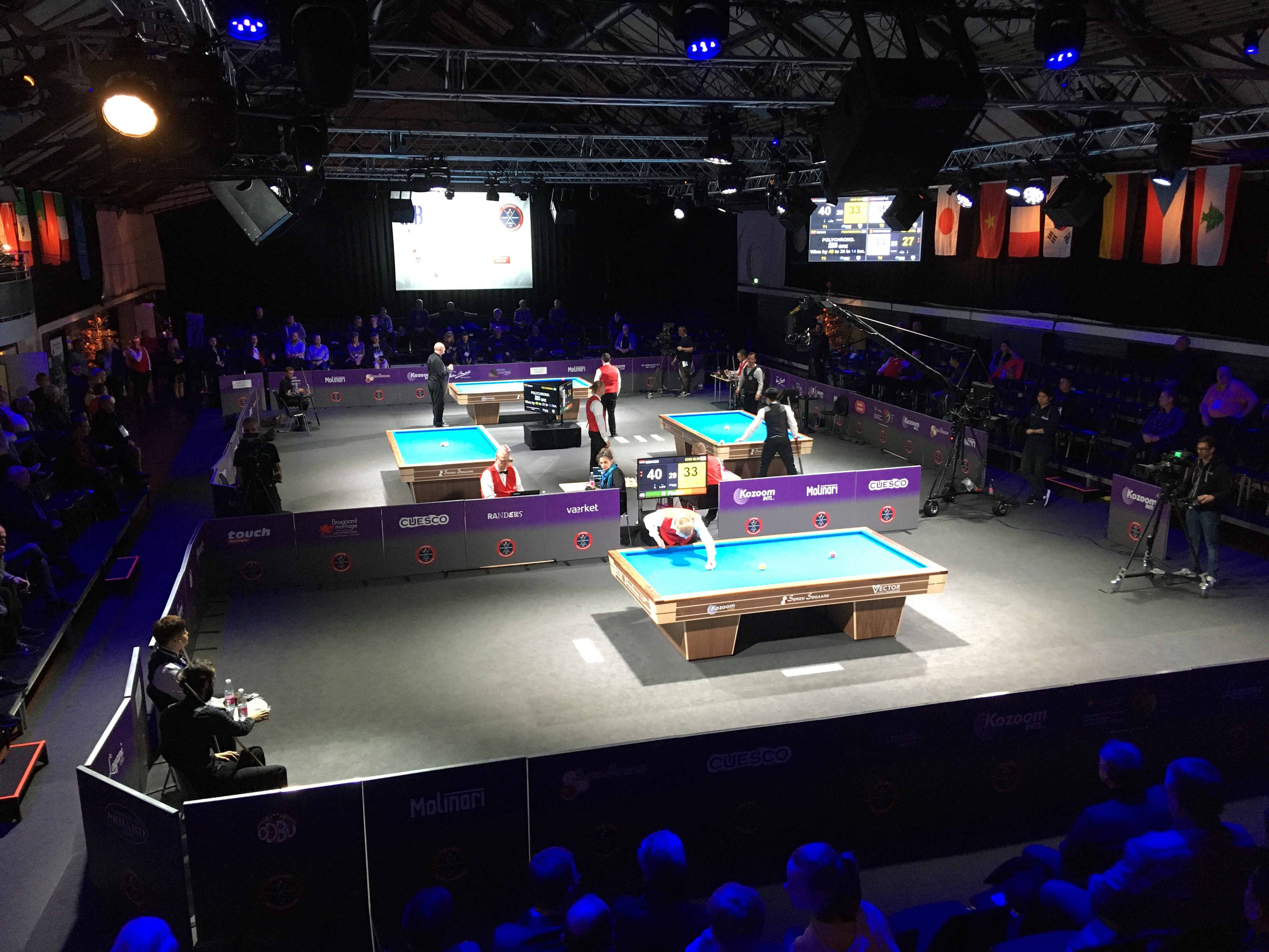 Dreiband-Weltmeisterschaft 2019 im Vaerket, Randers, Dänemark